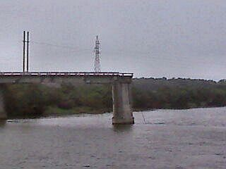 Puente sobre el río Tonala entre Veracruz y Tabasco; caido en Junio 2009.